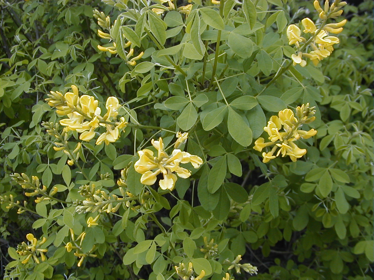 Petteria ramentacea. Real Jardín Botánico, Madrid.